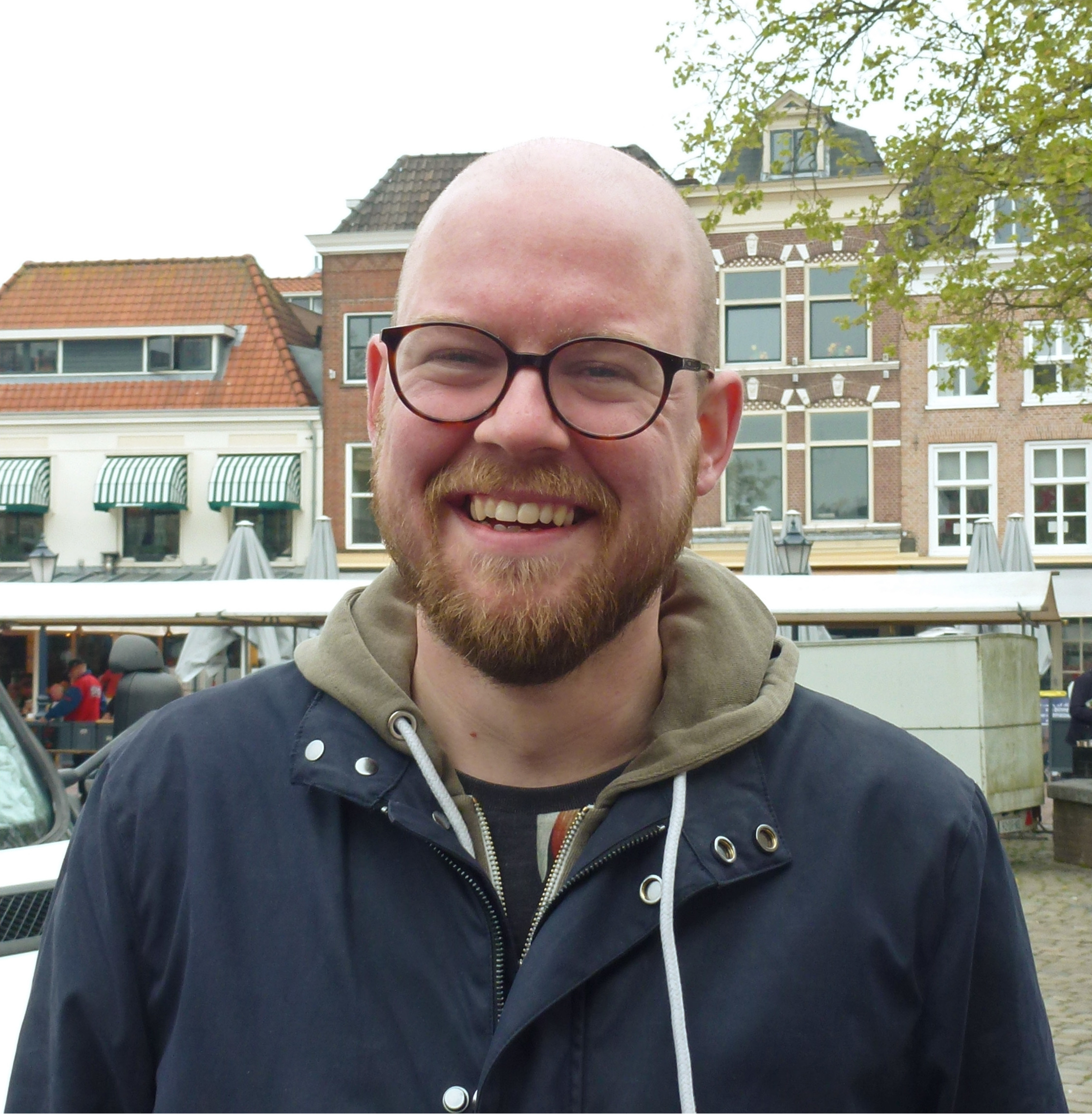 Rob van Barneveld woont in Utrecht en is striptekenaar/illustrator. Hij won in 2014 de Benelux Beeldverhalen Prijs. Bron: Foto genomen tijdens Strips op de Markt (Gouda, 7 mei 2017)